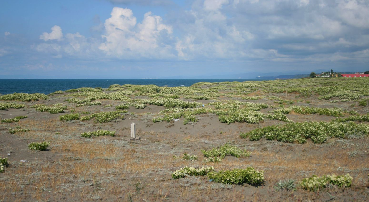 Cionura erecta, Hundsgiftgewächse (Apocynaceae), Seidenpflanzengewächse (Asclepiadoideae), Habitat - Türkei/Türkiye/Turkey: Sakarya Prov./Sakarya ili, Sandküste des Schwarzen Meers (Karadeniz) bei Kocaali E Karasu